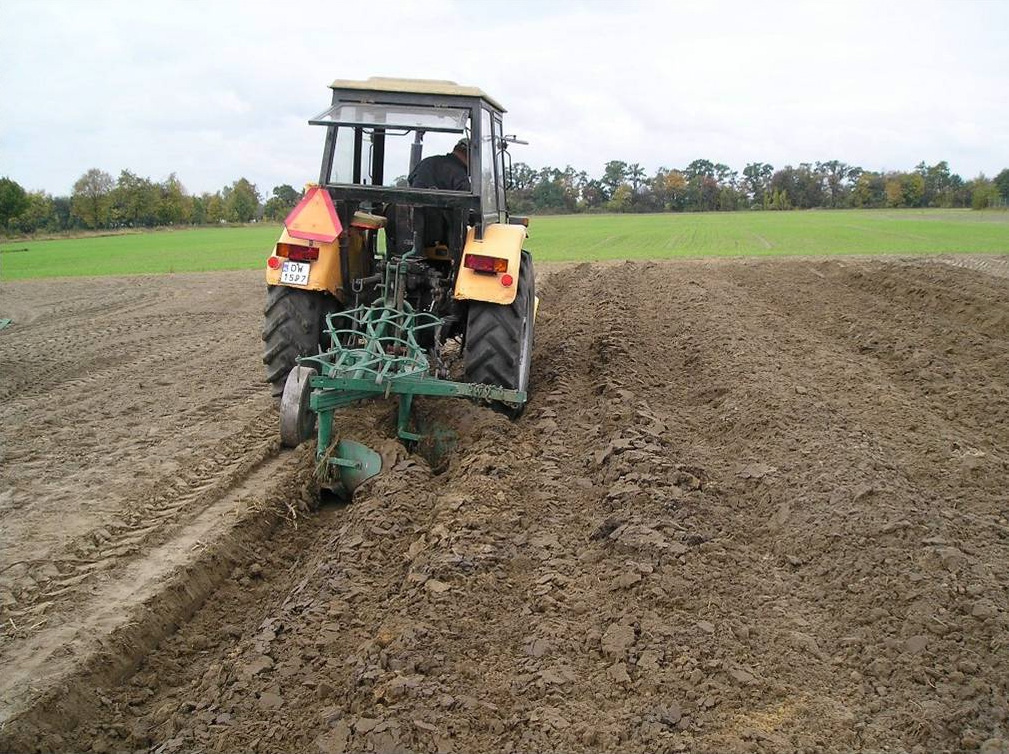 Orka pługiem dwuskibowym ciągnikiem Ursus C-360.